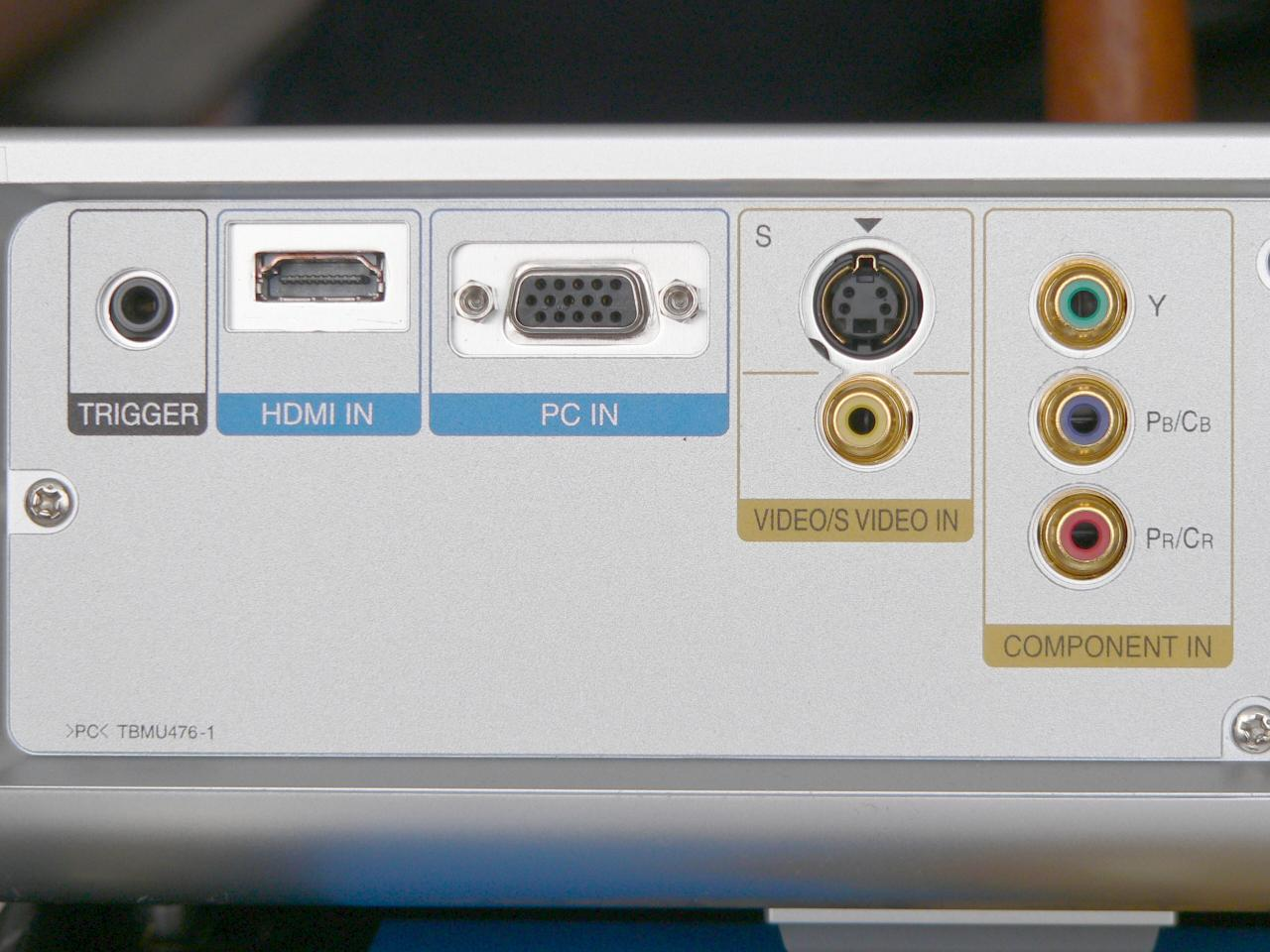 Anschlüsse eines Beamers